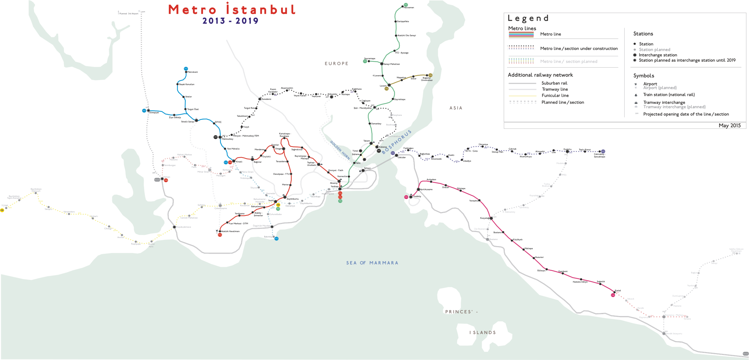 Istanbul Metro Network Projects Netzplan der Metro Istanbul Mini-Metro Bakirköy-Beylikdüzü-Metro Üsküdar-Sancaktepe Metro Kabatas-Besiktas-Mahmutbey Metro